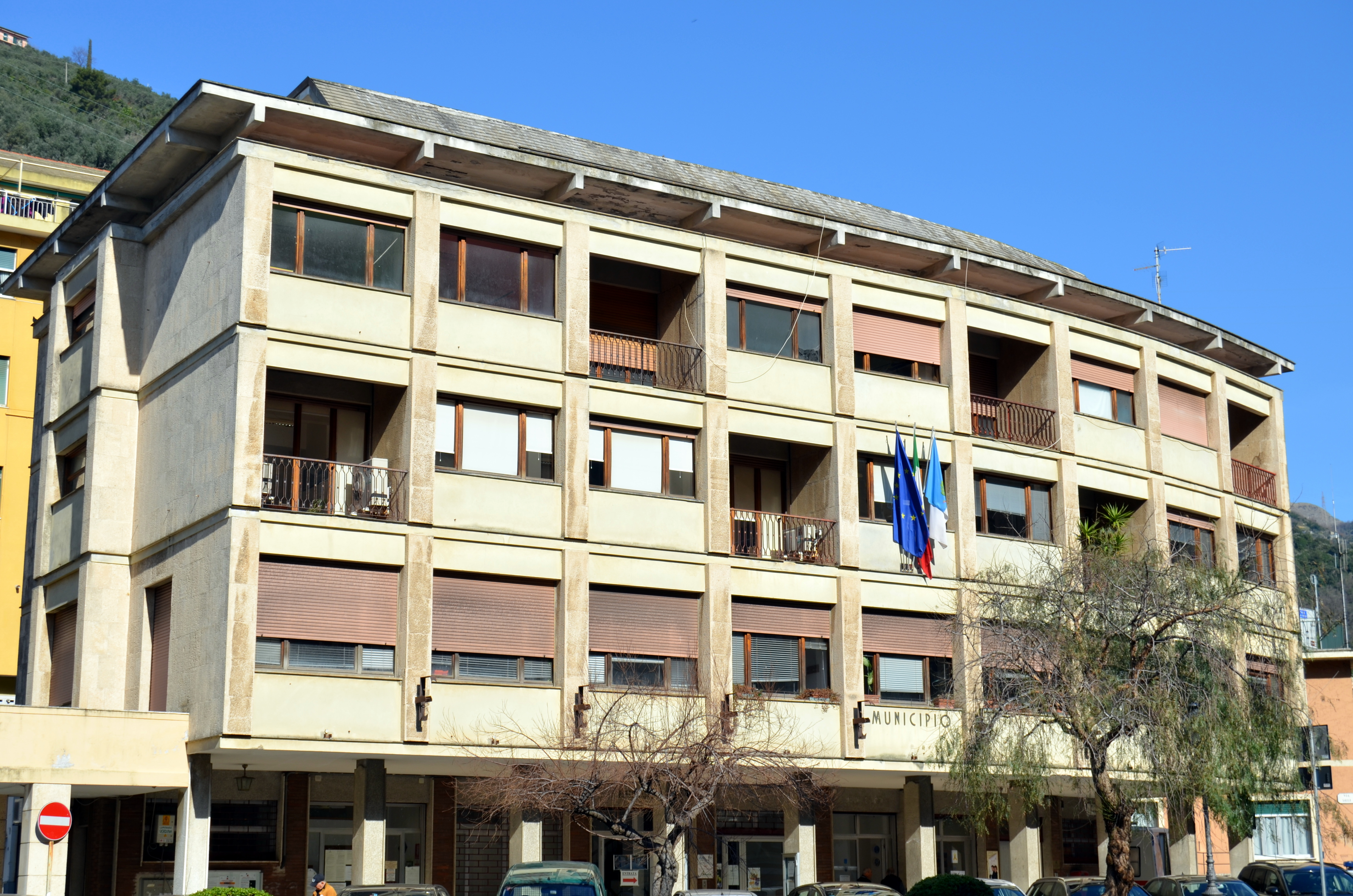 Palazzo comunale di Sori, Liguria, Italia